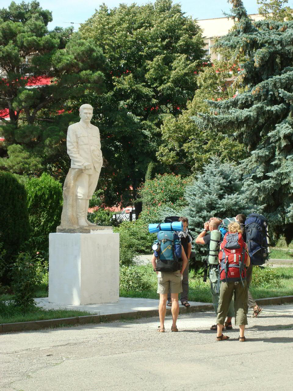 backpackers et Staline